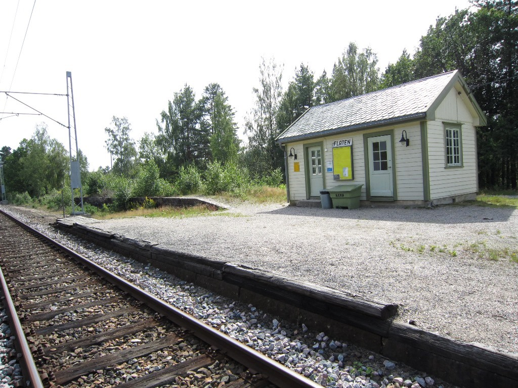 Flaten holdeplass (tidl. stoppested) på Arendalsbanen